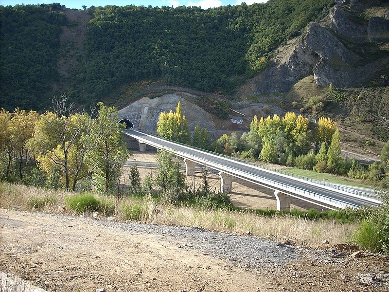 Viaducto de Alba en la Variante de Pajares